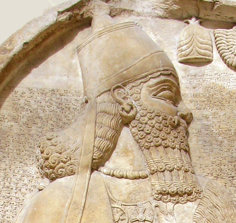 Ashurnasirpal II, British Museum, London